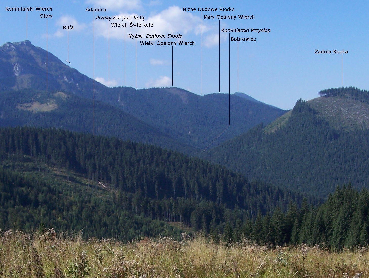 Widok z Przysłopu Miętusiego